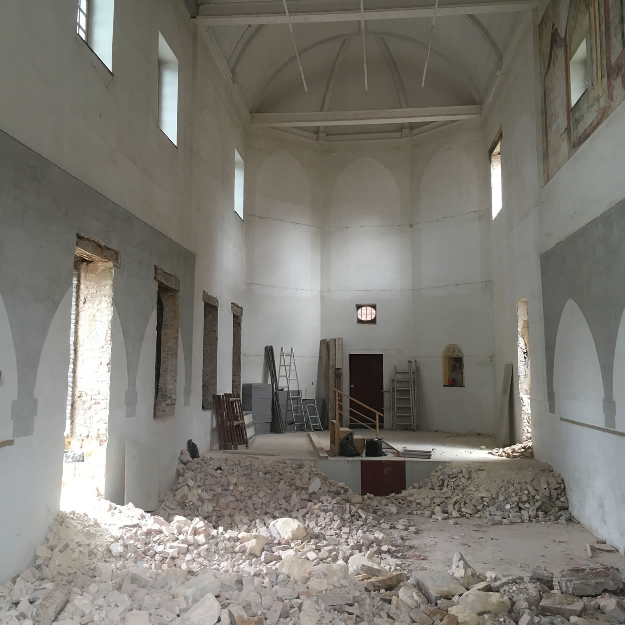 Renovatiewerkzaamheden aan de Andrieskapel te Maastricht